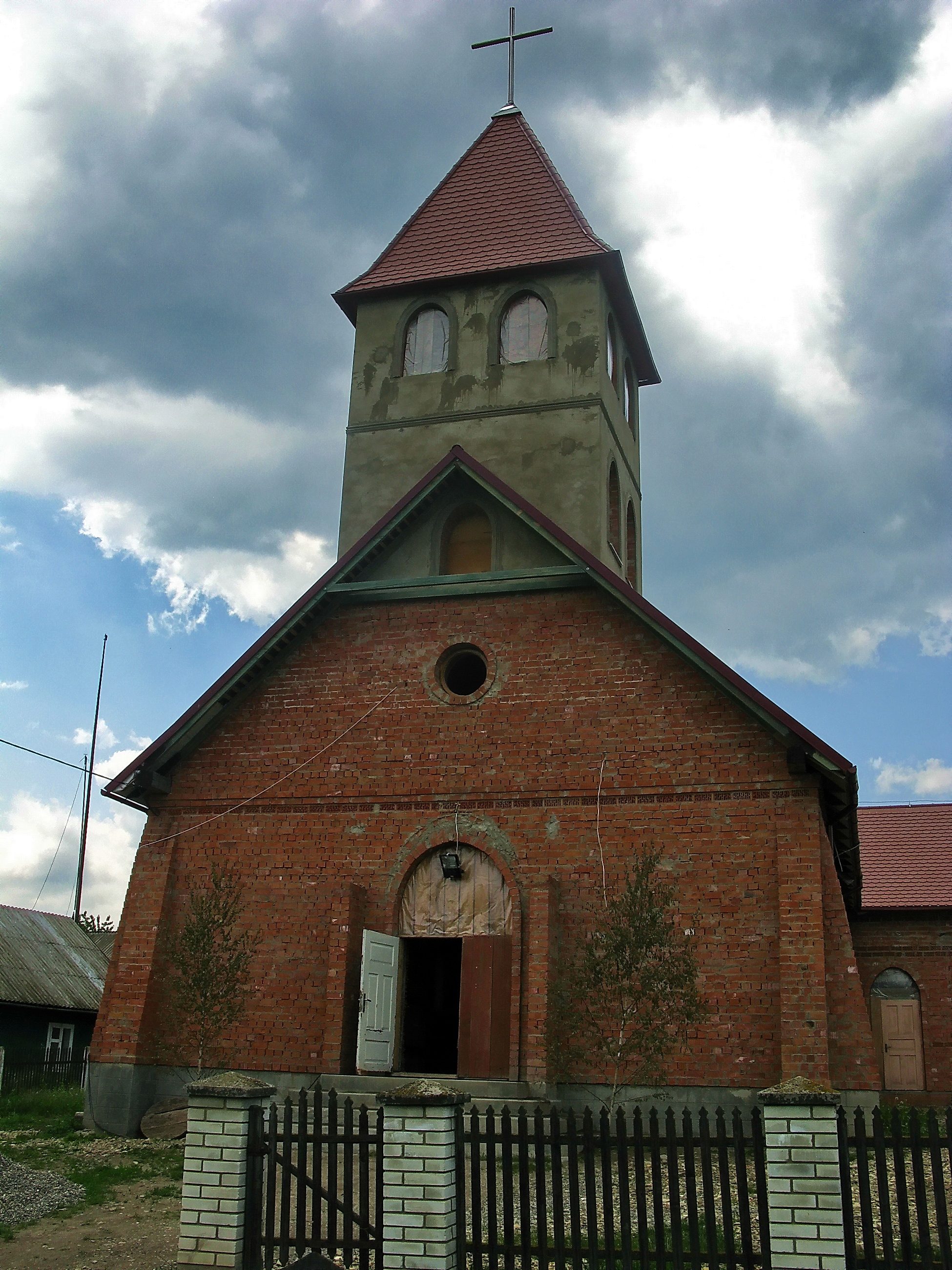 Biserica „Schimbarea la Față” din Pătrăuții de Jos, raionul Storojineț, regiunea Cernăuți, Ucraina